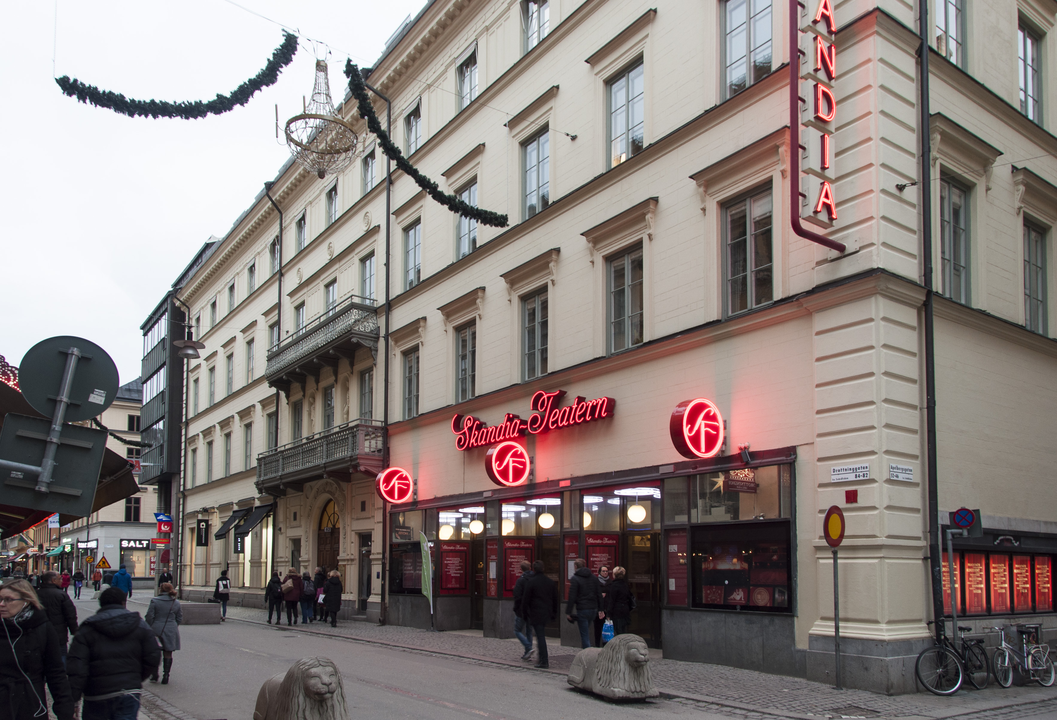 Warodellska huset, Svärdfisken 2, Drottninggatan 82, Apelbergsgatan 50-52 Nybyggnadsår 1851 - 1854 Fredrik Wilhelm Scholander (Arkitekt) L. I. Warodell (Byggherre)